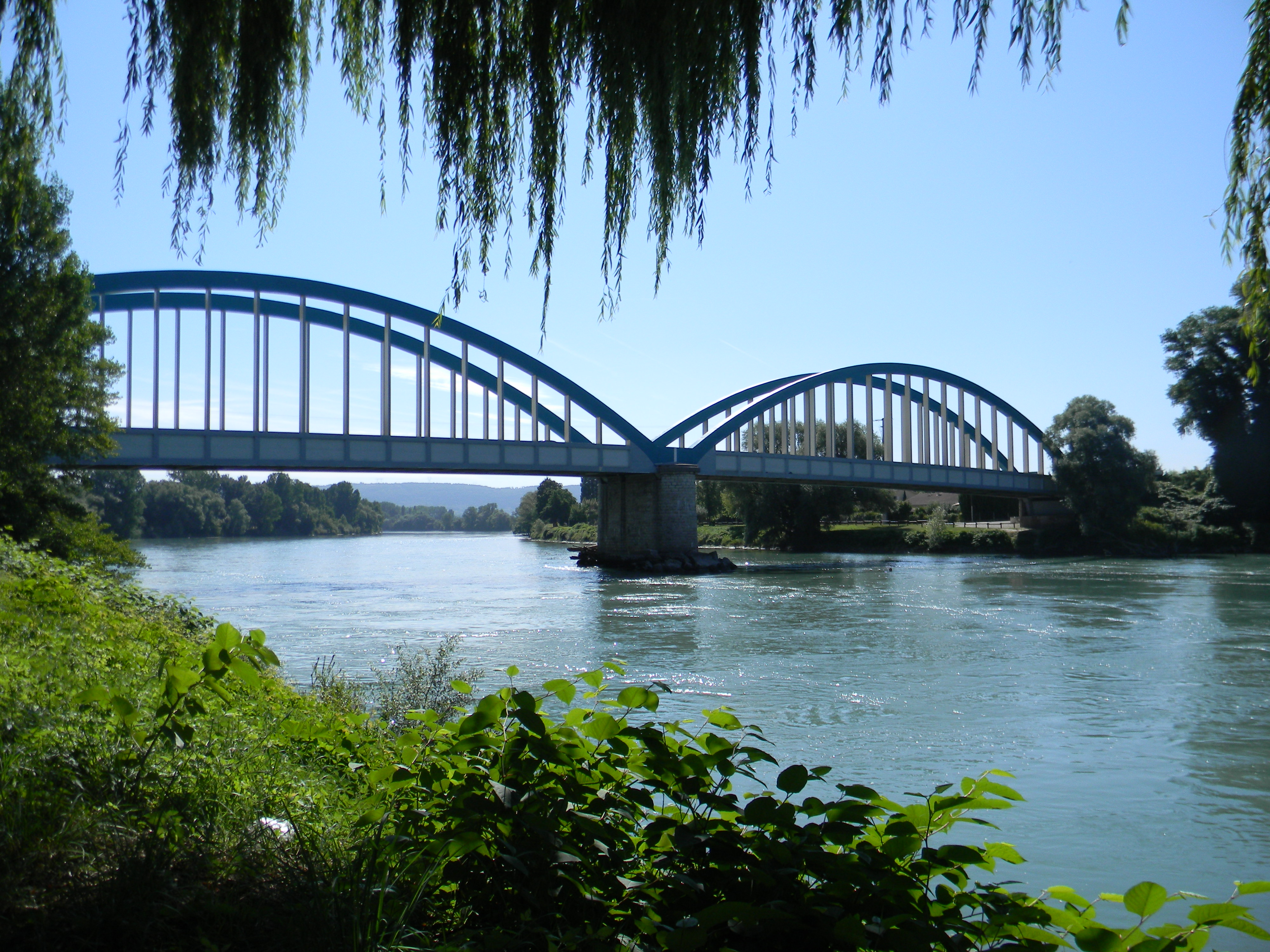 Pont de Loyettes, utilisé comme logotype de la commune.